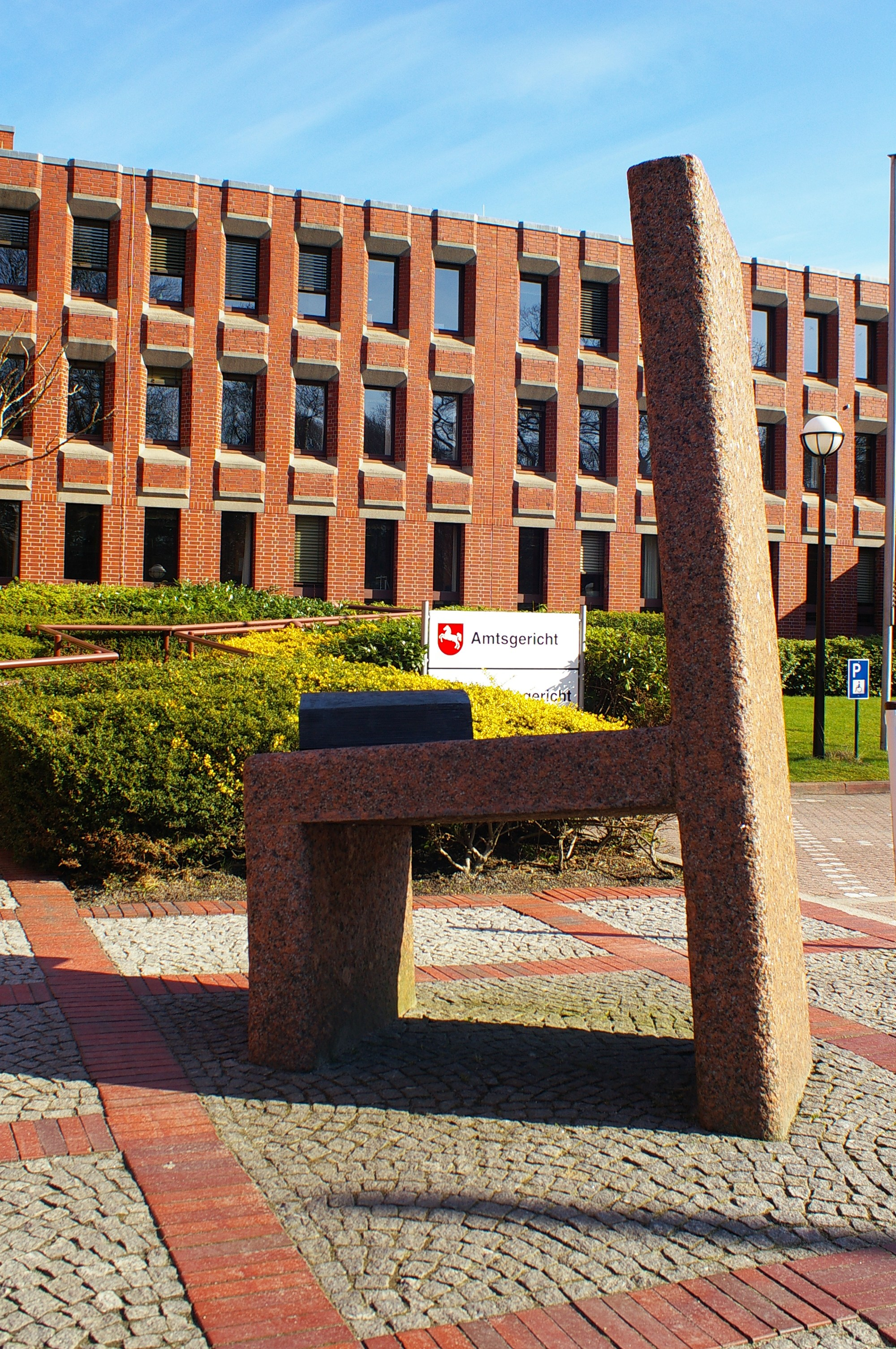 Skulptur von Udo Reimann, am Amts- und Arbeitsgericht Wilhelmshaven, Niedersachsen, Deutschland